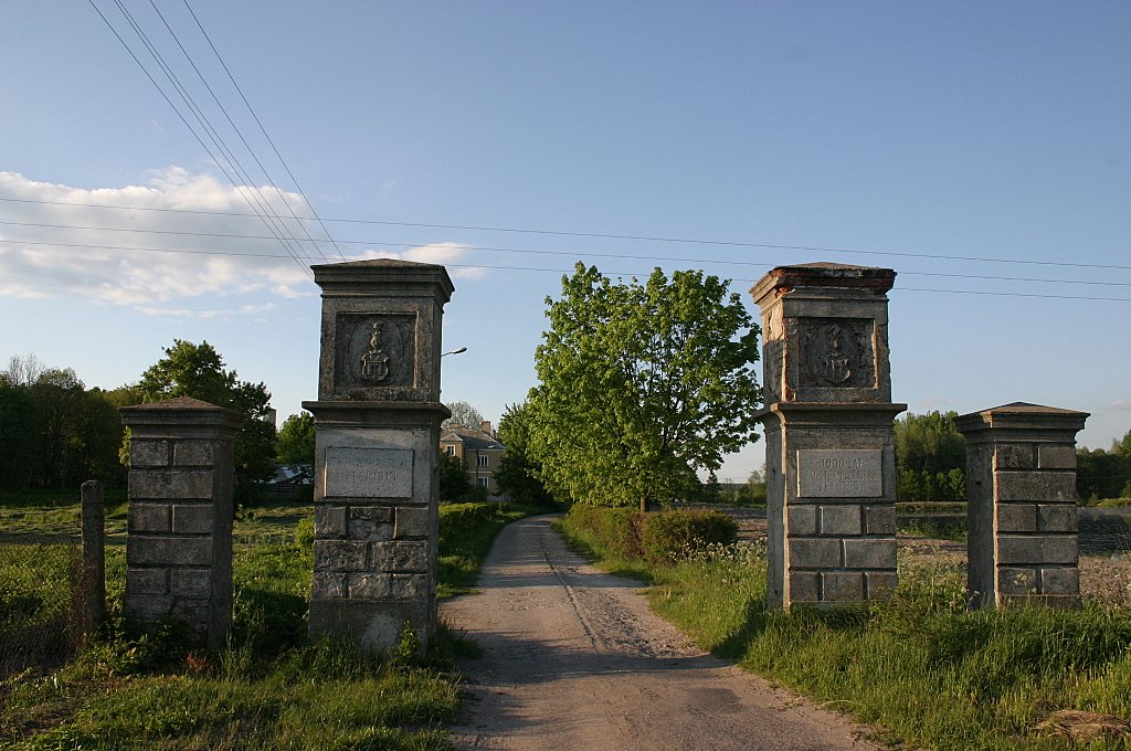 Brama Kisielnickich 04.1980.